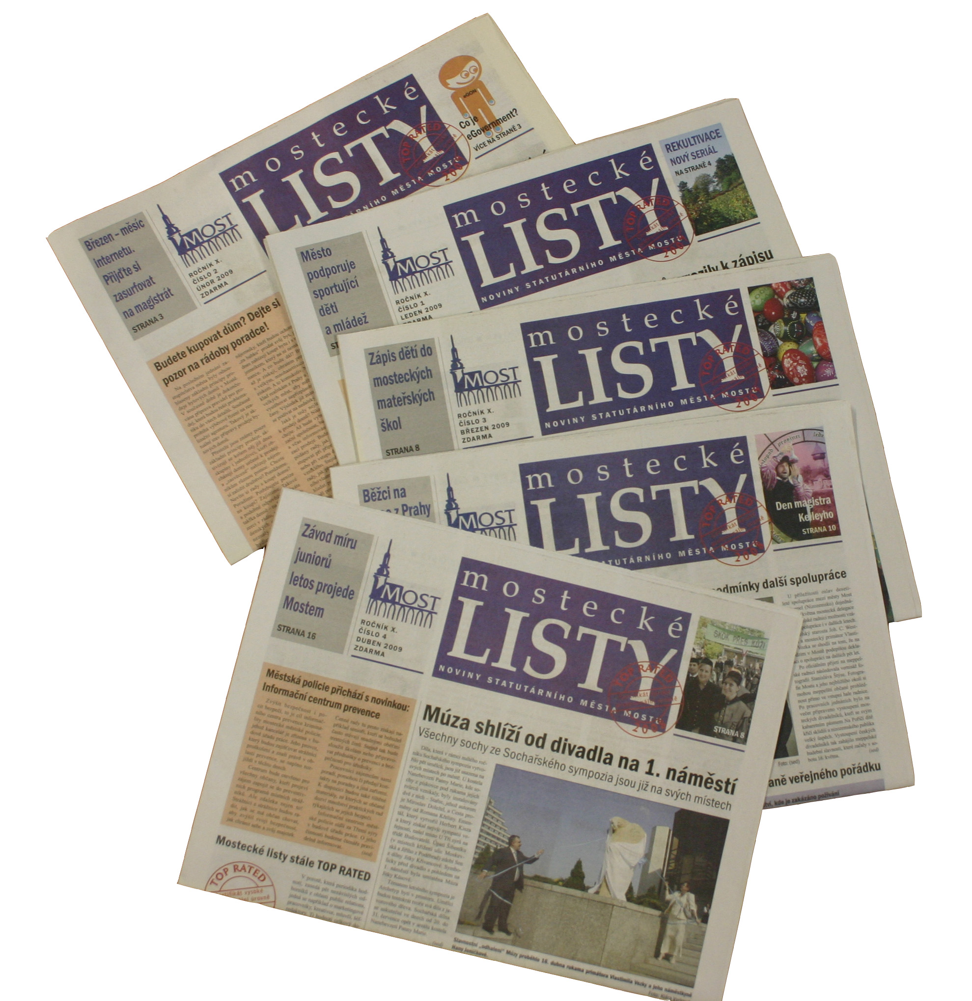 Mostecké listy: leden-květen 2009